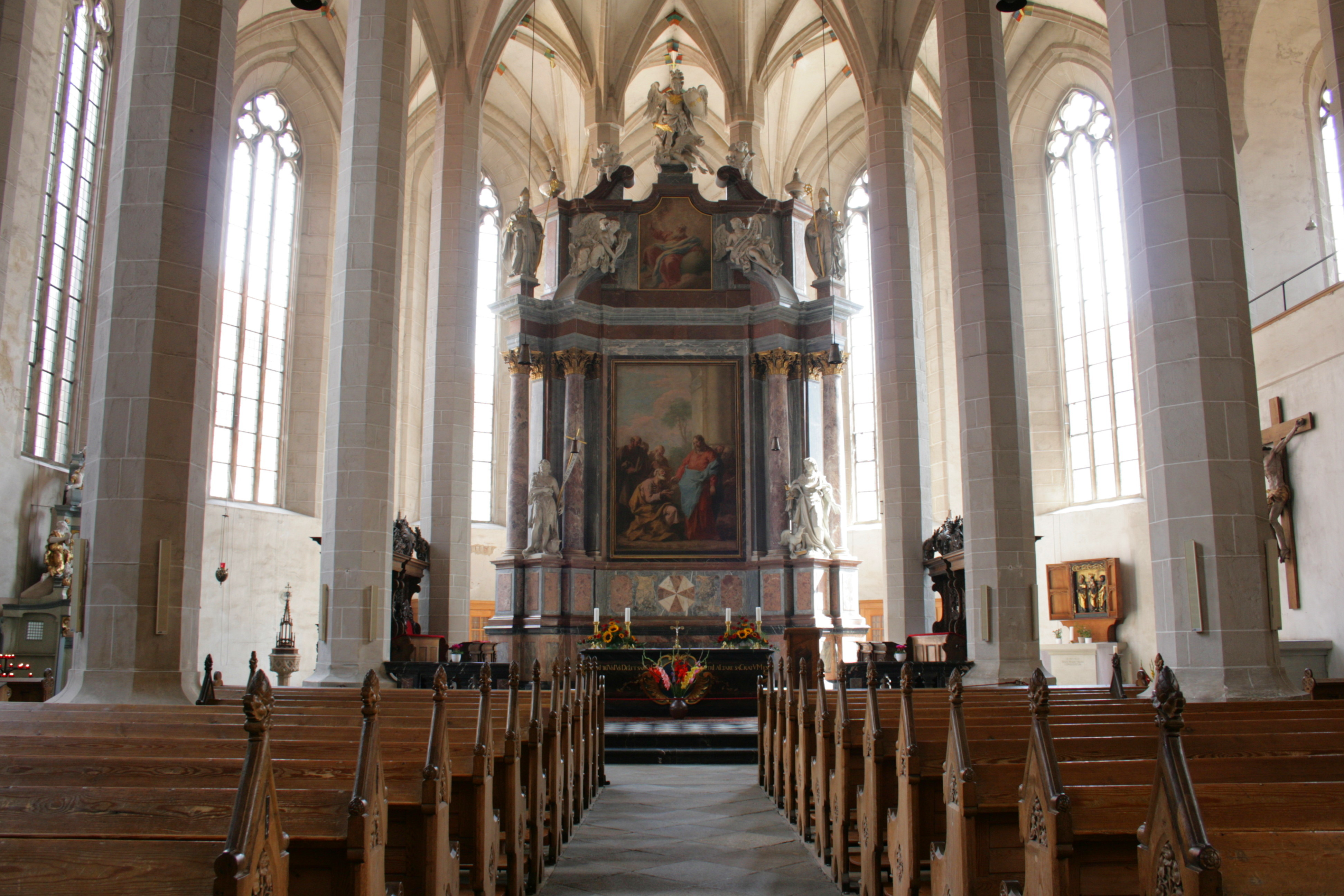 Dom St. Petri in Bautzen, katholischer Teil Hornjoserbsce: Tachantska cyrkej swj. Pětra w Budyšinje; katolski dźěl.